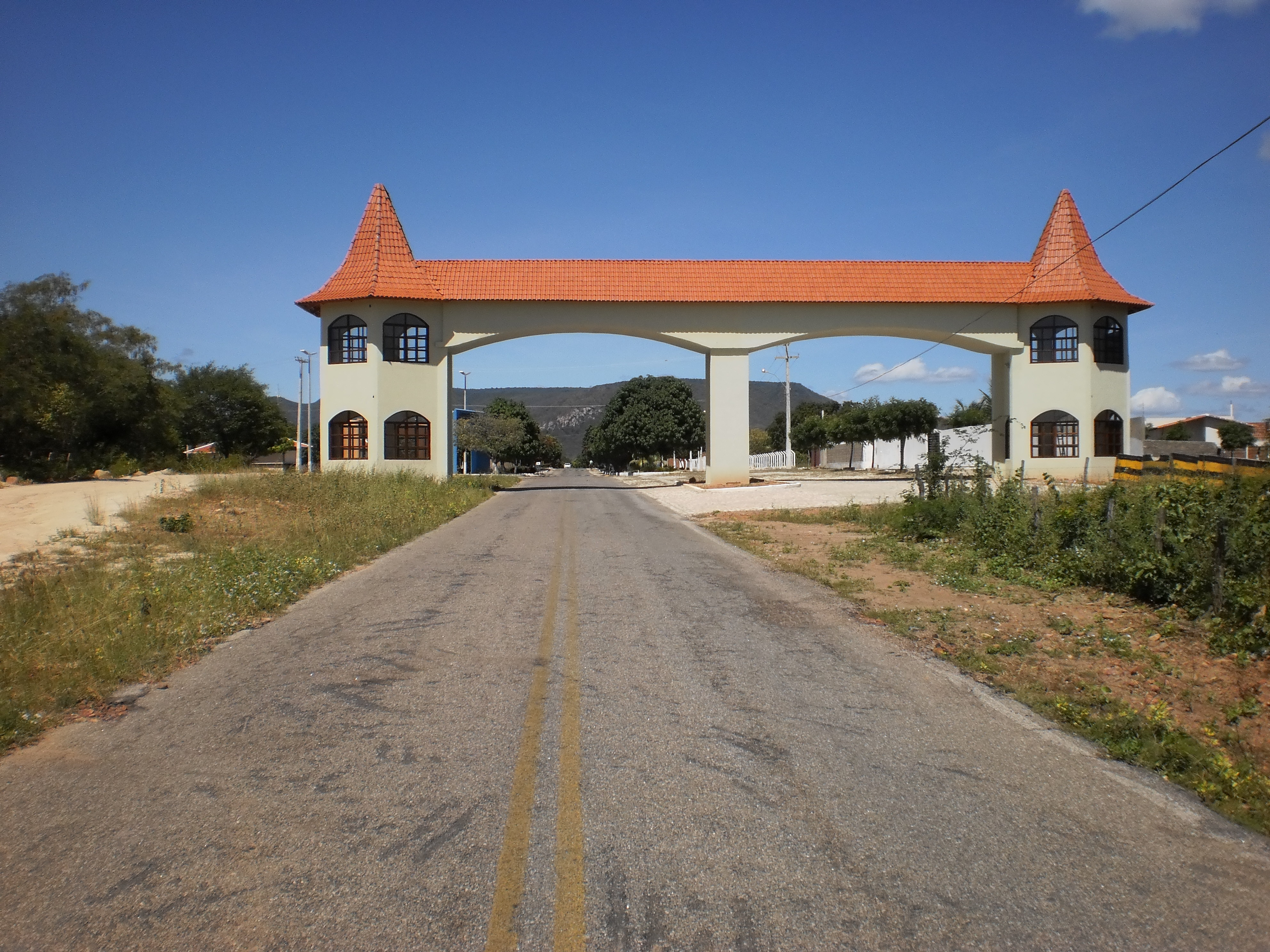 Pórtico de entrada de Viçosa, Rio Grande do Norte, Brasil.